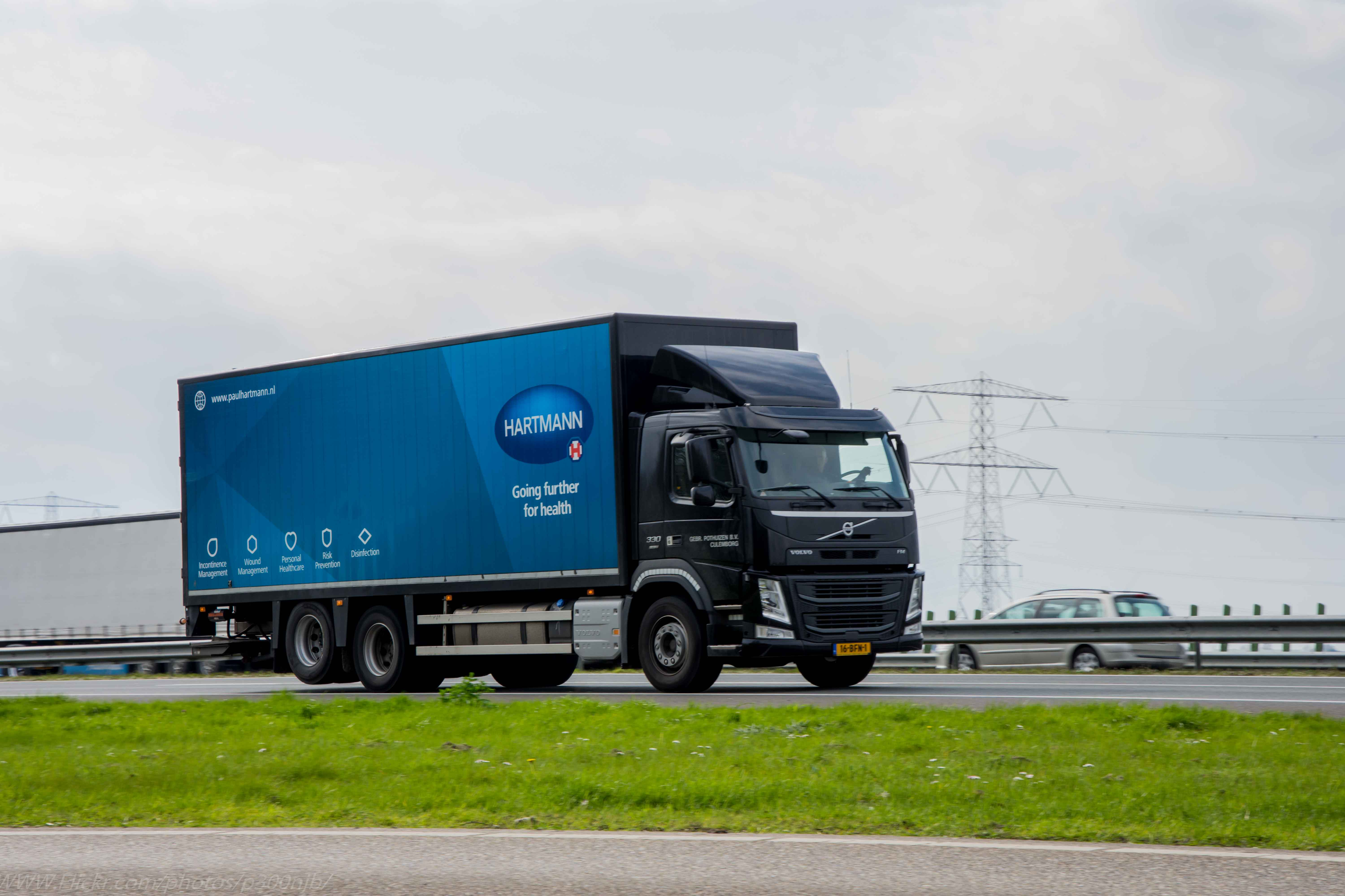 Gebr. Pothuizen / Paul Hartmann (Hartmann Gruppe)